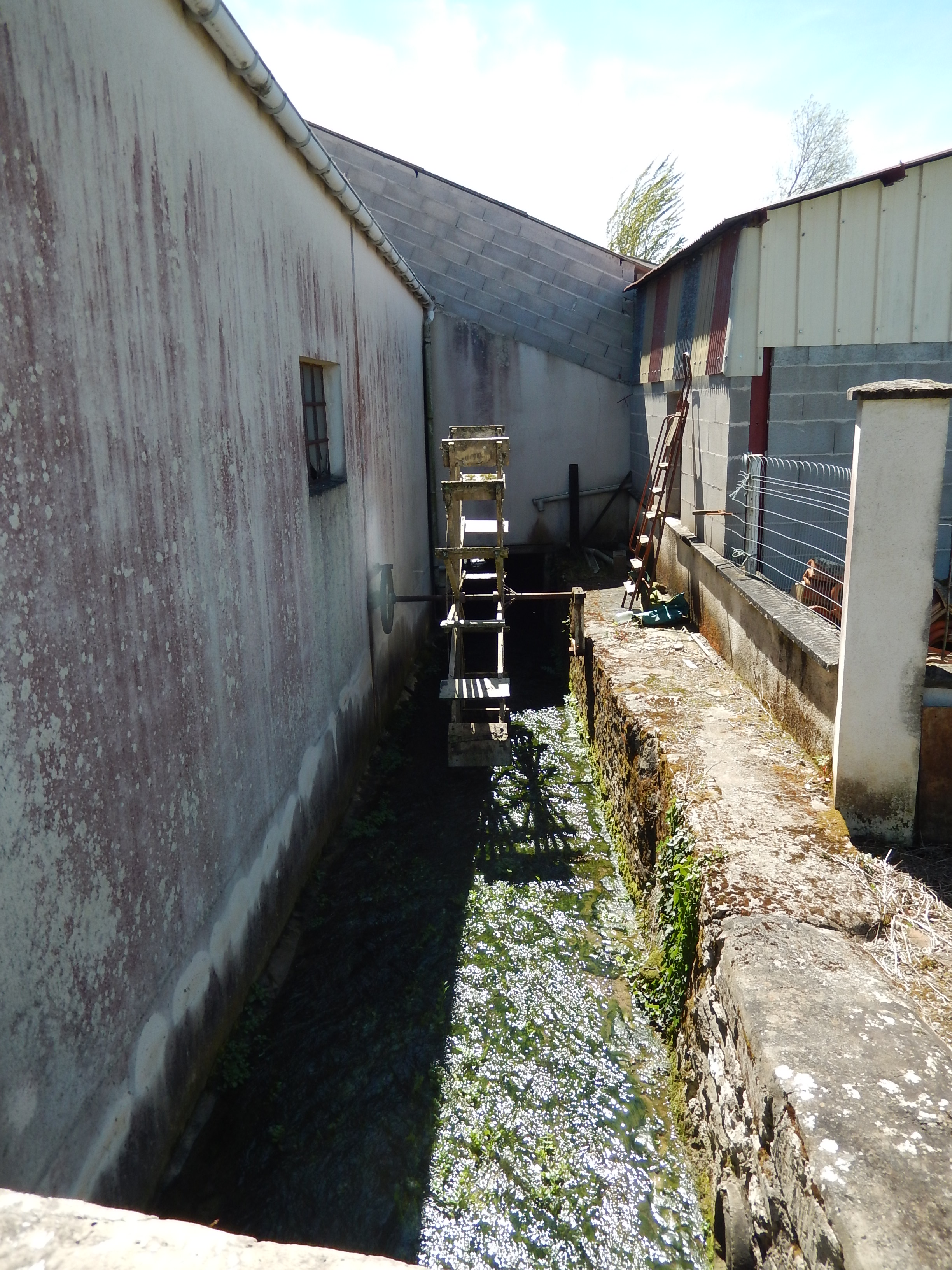 La rivière Devise coule à Beauroux, un lieu-dit de la commune de Saint-Laurent-de-la-Barrière. On remarquera la présence d'une petite roue à eau.